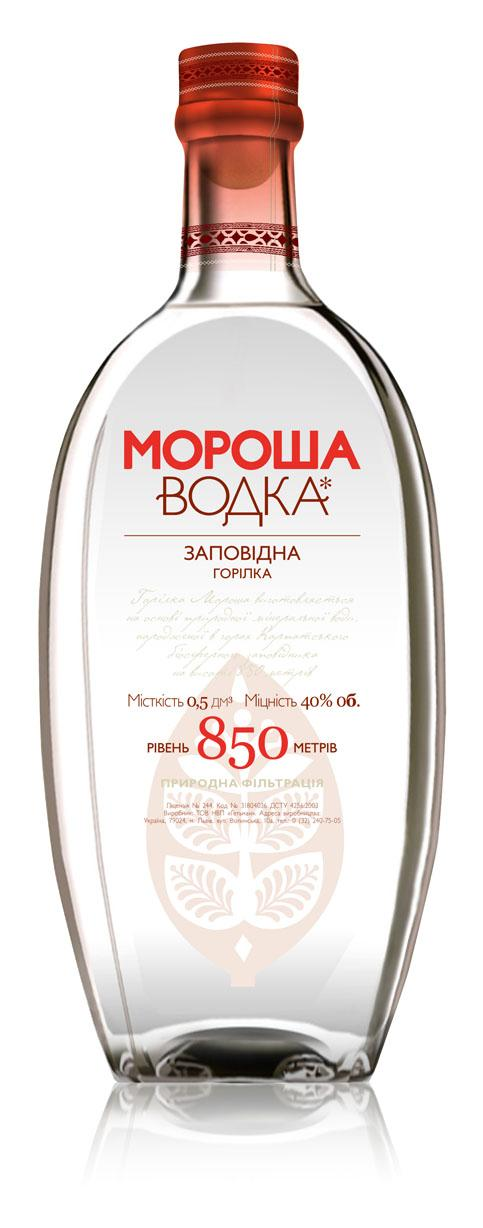 Мороша Заповедная